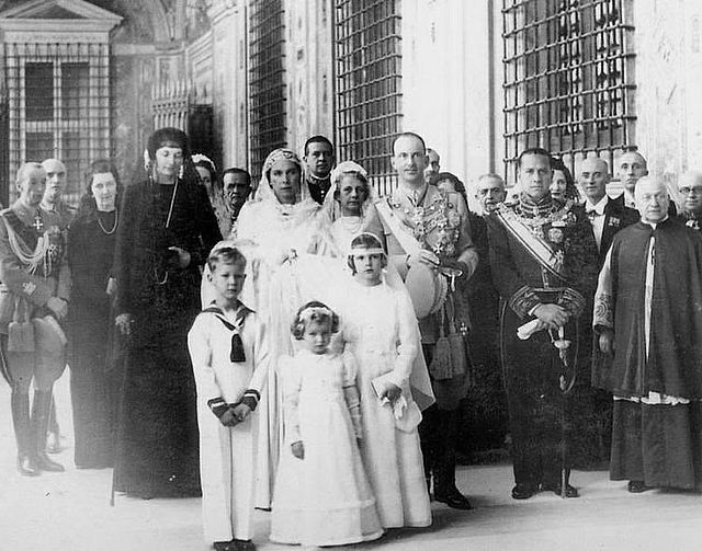 La Familia Real Italiana visita al Papa Pio XII al ascender al trono, Humberto II. Año 1946.